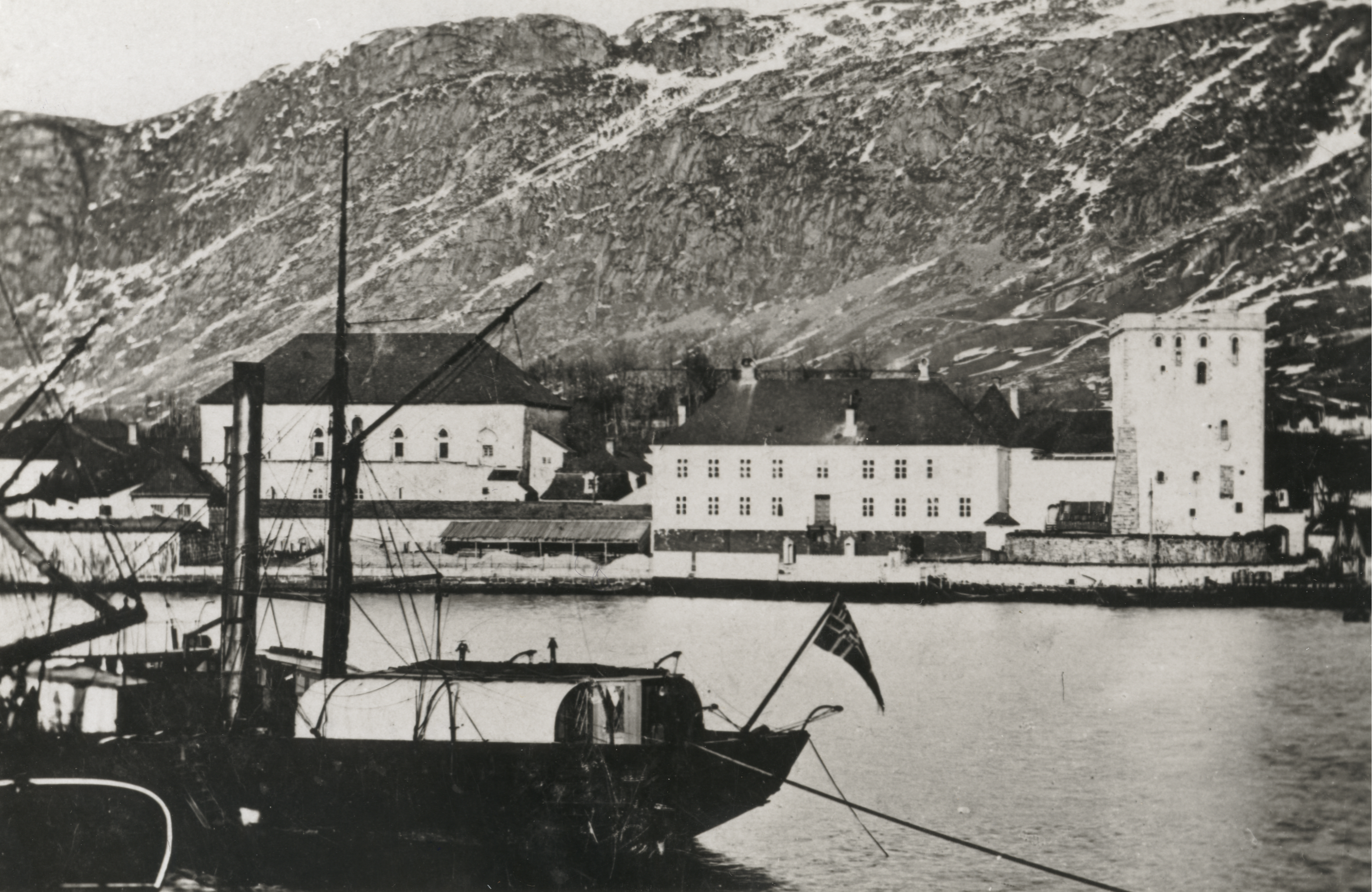 Bergenhus, Rosenkrantztårnet, Håkonshallen, Hordaland Bilde fra Stein Thowsen-samlingen i Bergen